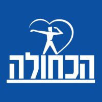 לוגו עמותת הכחולה